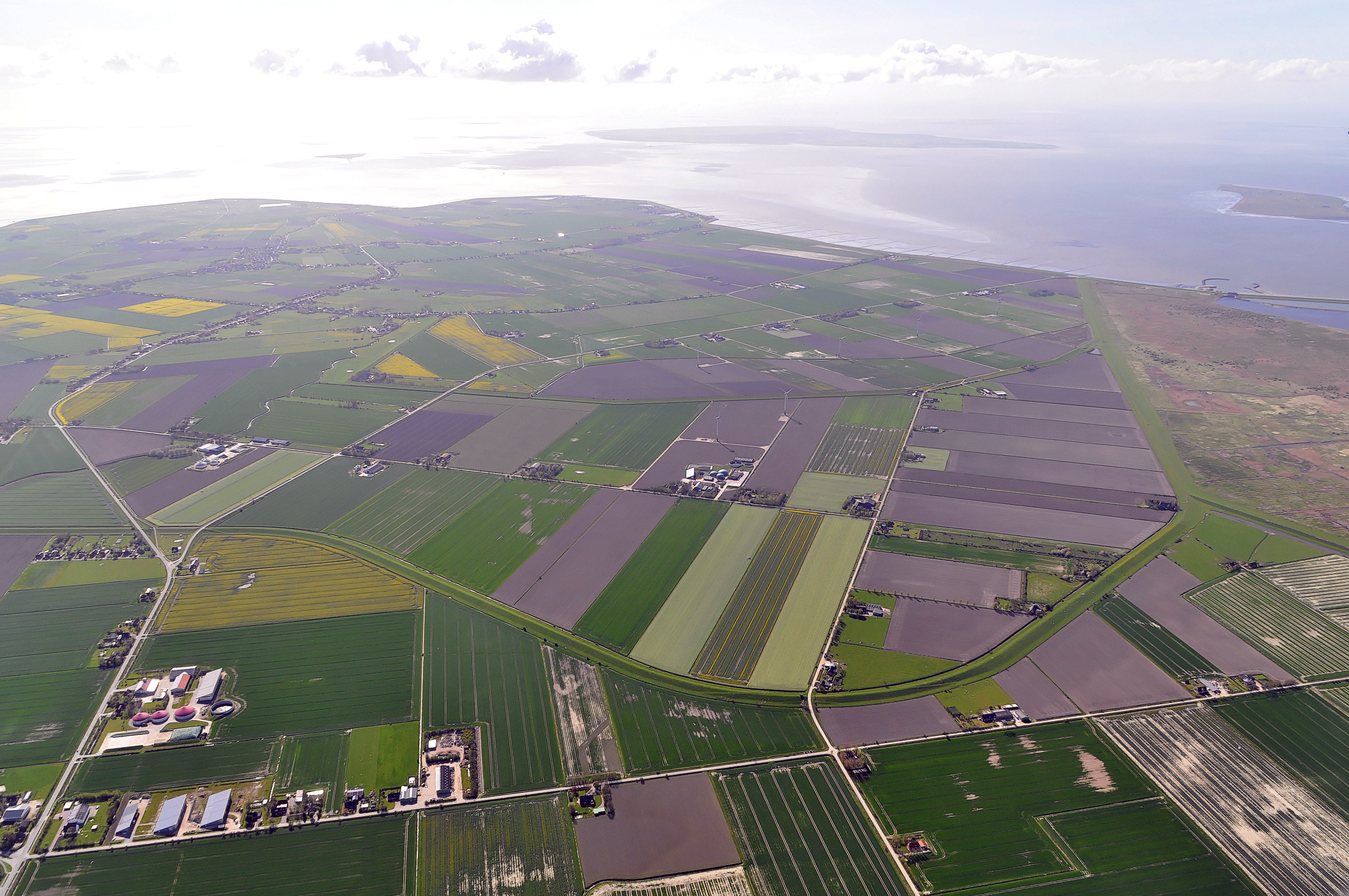 Schrägluftbild von Kögen auf Nordstrand (Blickrichtung West). Vom unteren Bildrand bis zur ersten Deichlinie befindet sich der Pohnshalligkoog. Darüber folgen bis zur nächsten Deichlinie Ländereien im Morsum-Koog. Vor der Außendeichlinie im Hintergrund folgt der Elisabeth-Sophien-Koog. Luftbilder von der Nordseeküste 2012-05